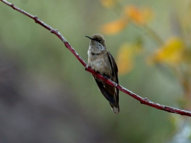 Andean Hillstar (Oreotrochilus estella). Lake Titicaca, Capachica, Peru